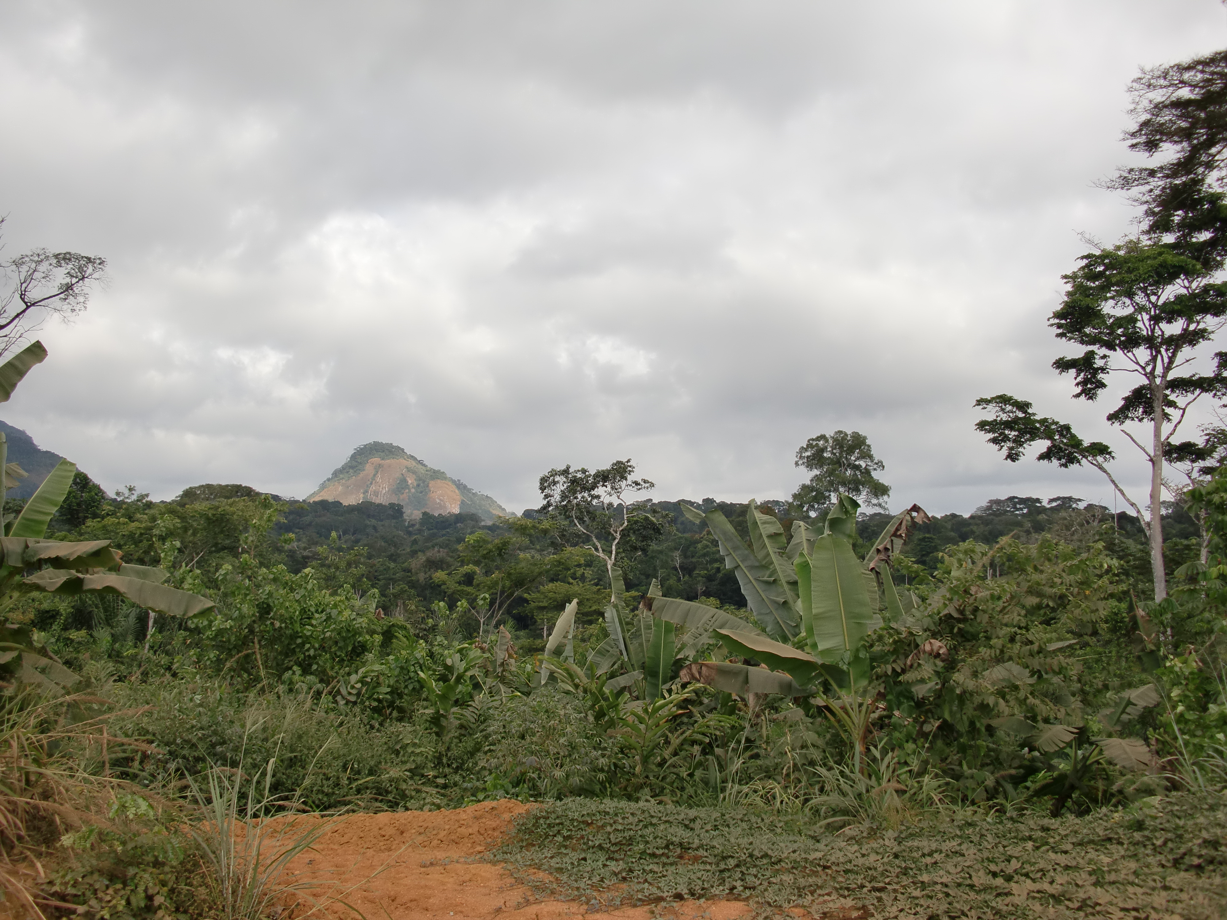 Landschaft im Hinterland von Äquatorialguinea